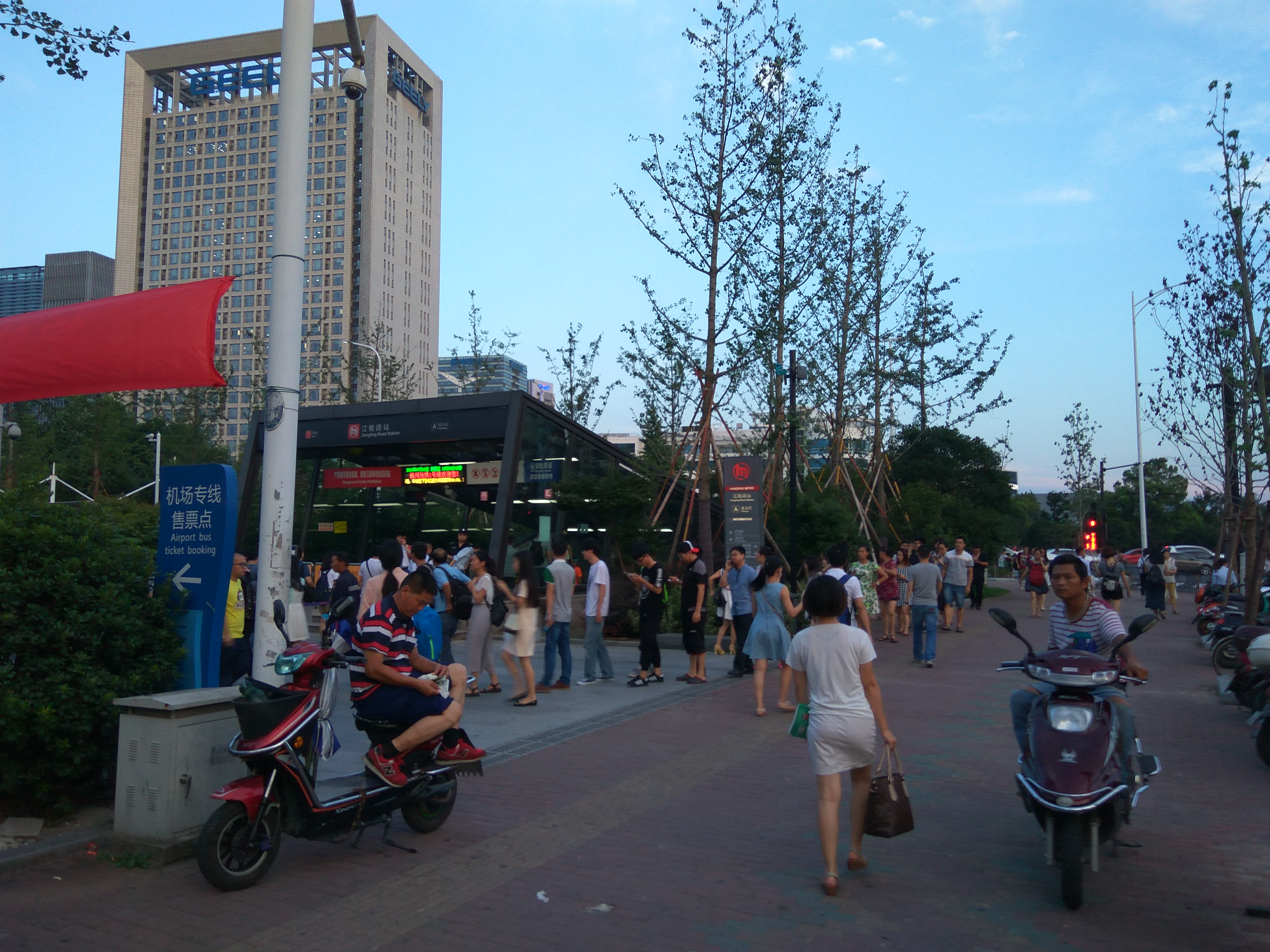 201607 周五晚高峰仅开放单向进站的江陵路站A1口前的队伍